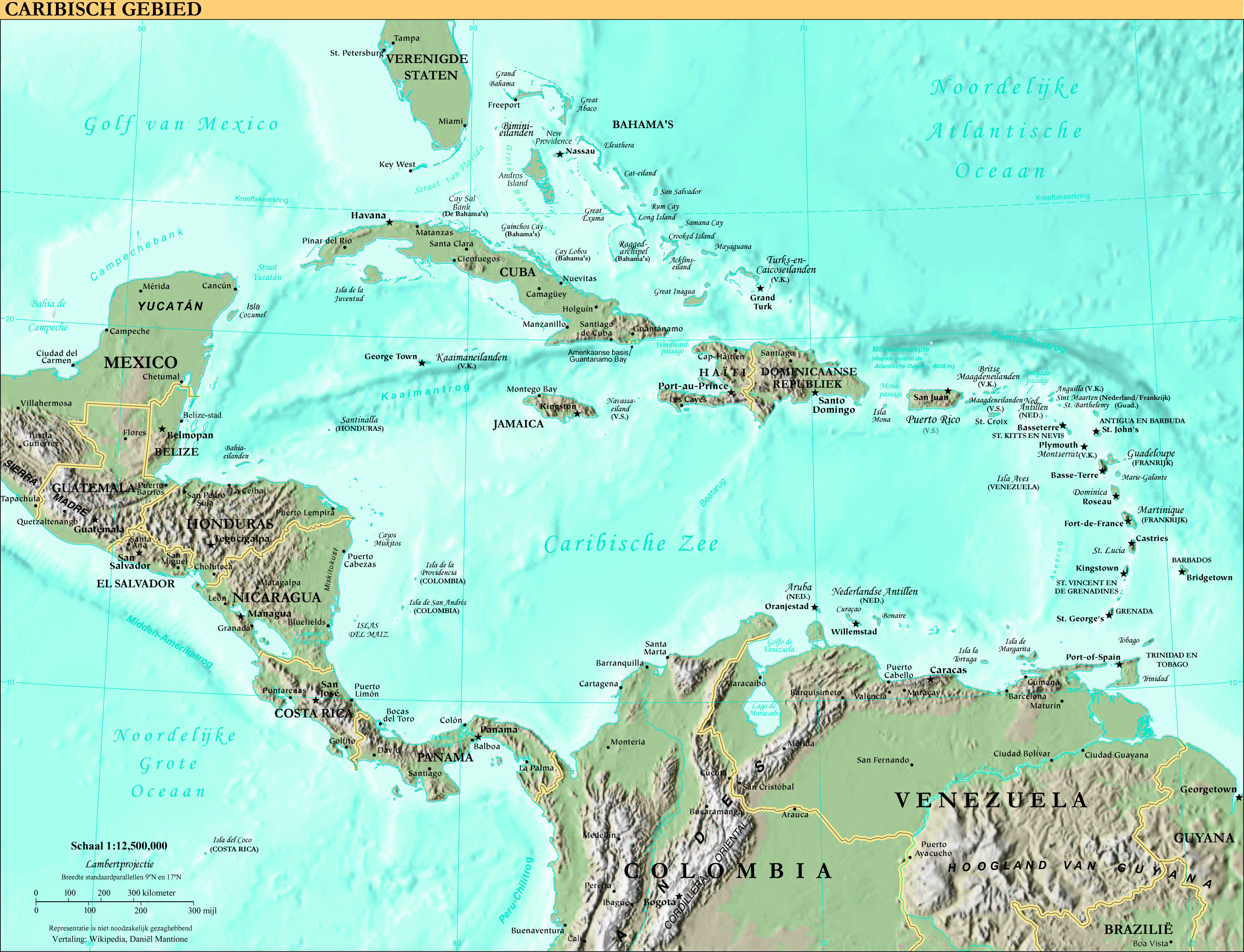 Nederlandse vertaling CIA-kaart